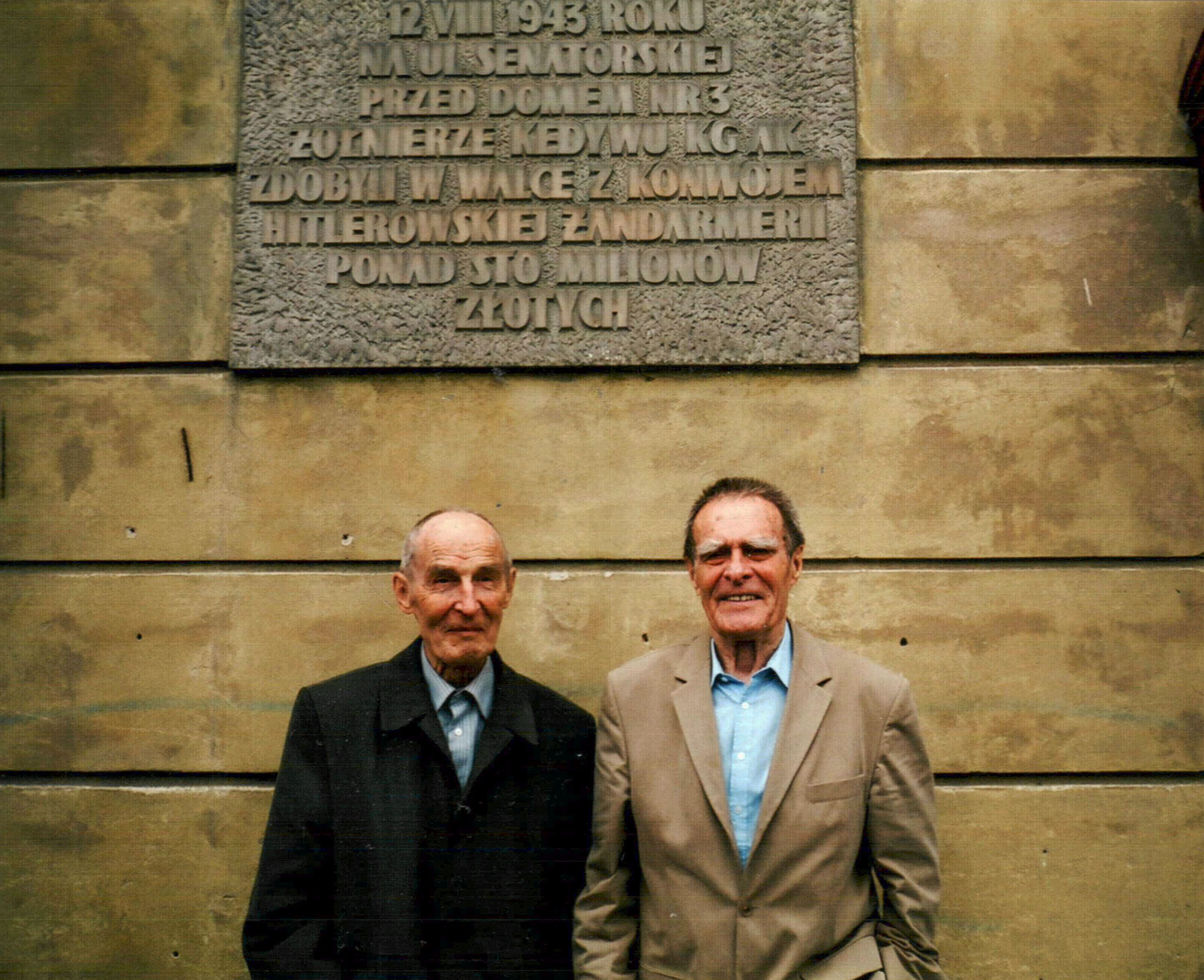 Dwaj żyjący (15-07-2013) uczestnicy akcji "Góral" Tadeusz (z lewej) i Andrzej Żupańscy.